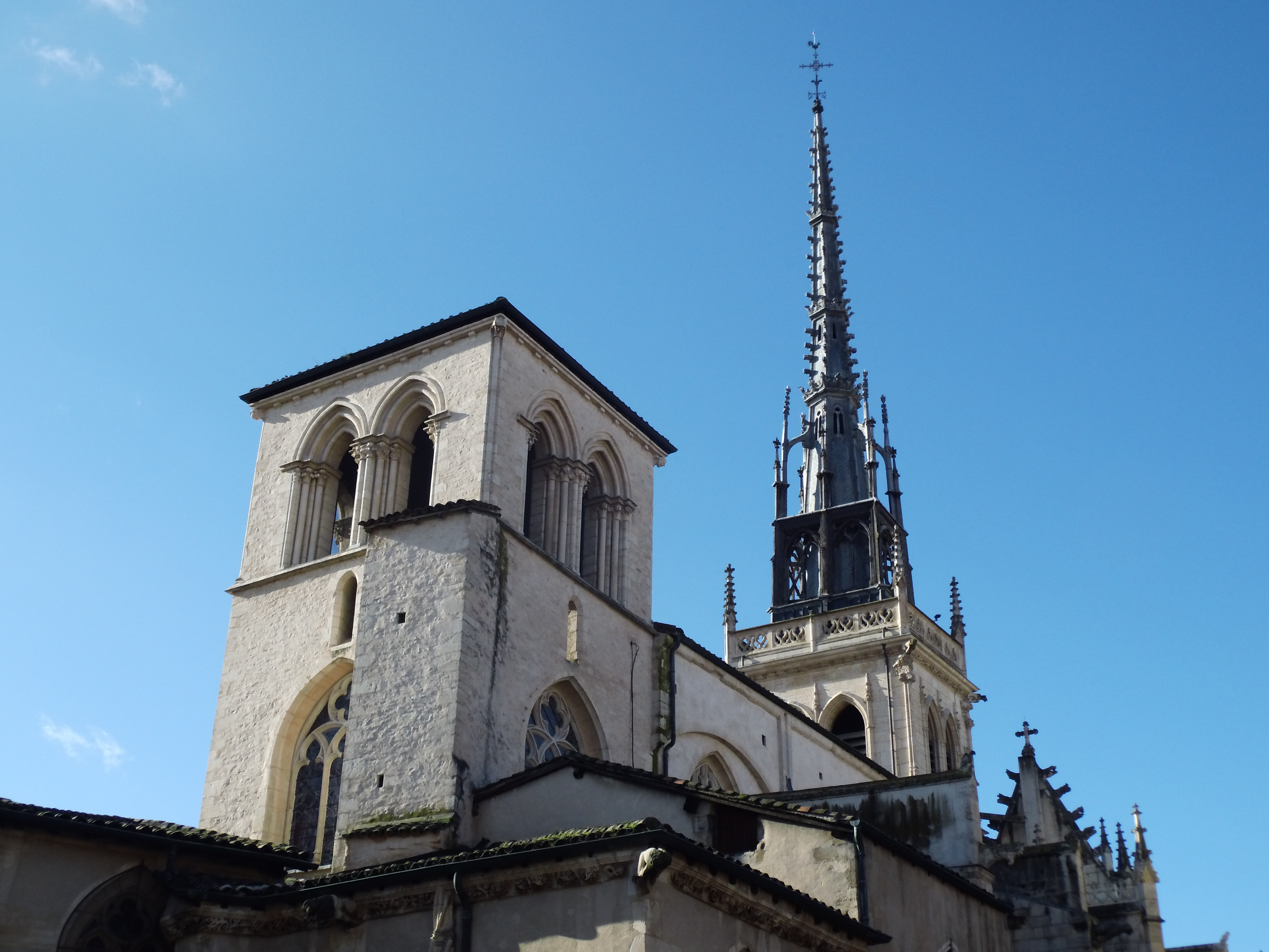 Depuis la place à l'arrière de l'église